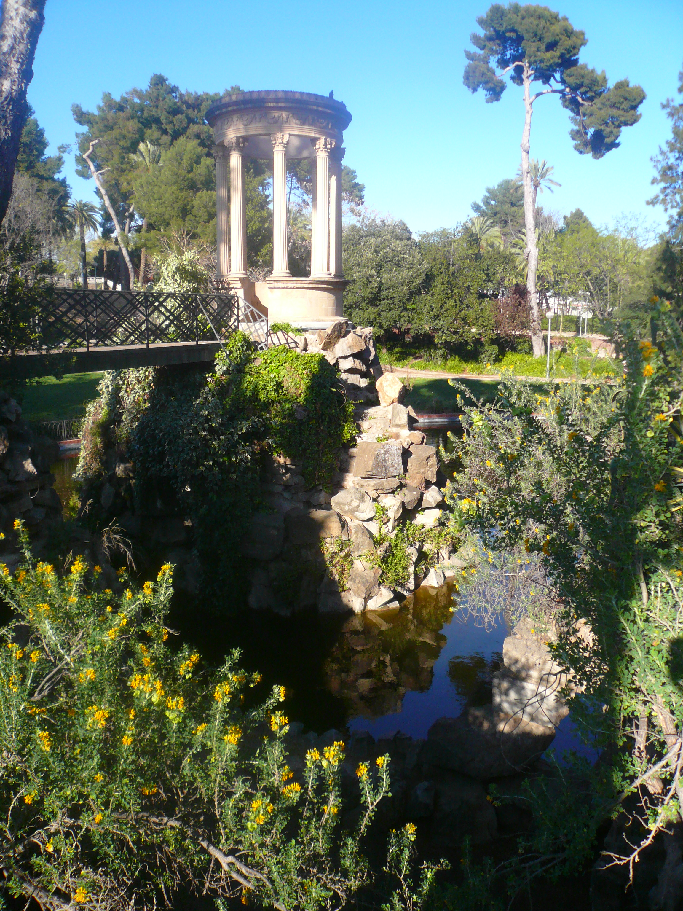 Templet al Parc de Can Vidalet (Esplugues de Llobregat) Object location41° 22′ 28.17″ N, 2° 05′ 48.33″ E